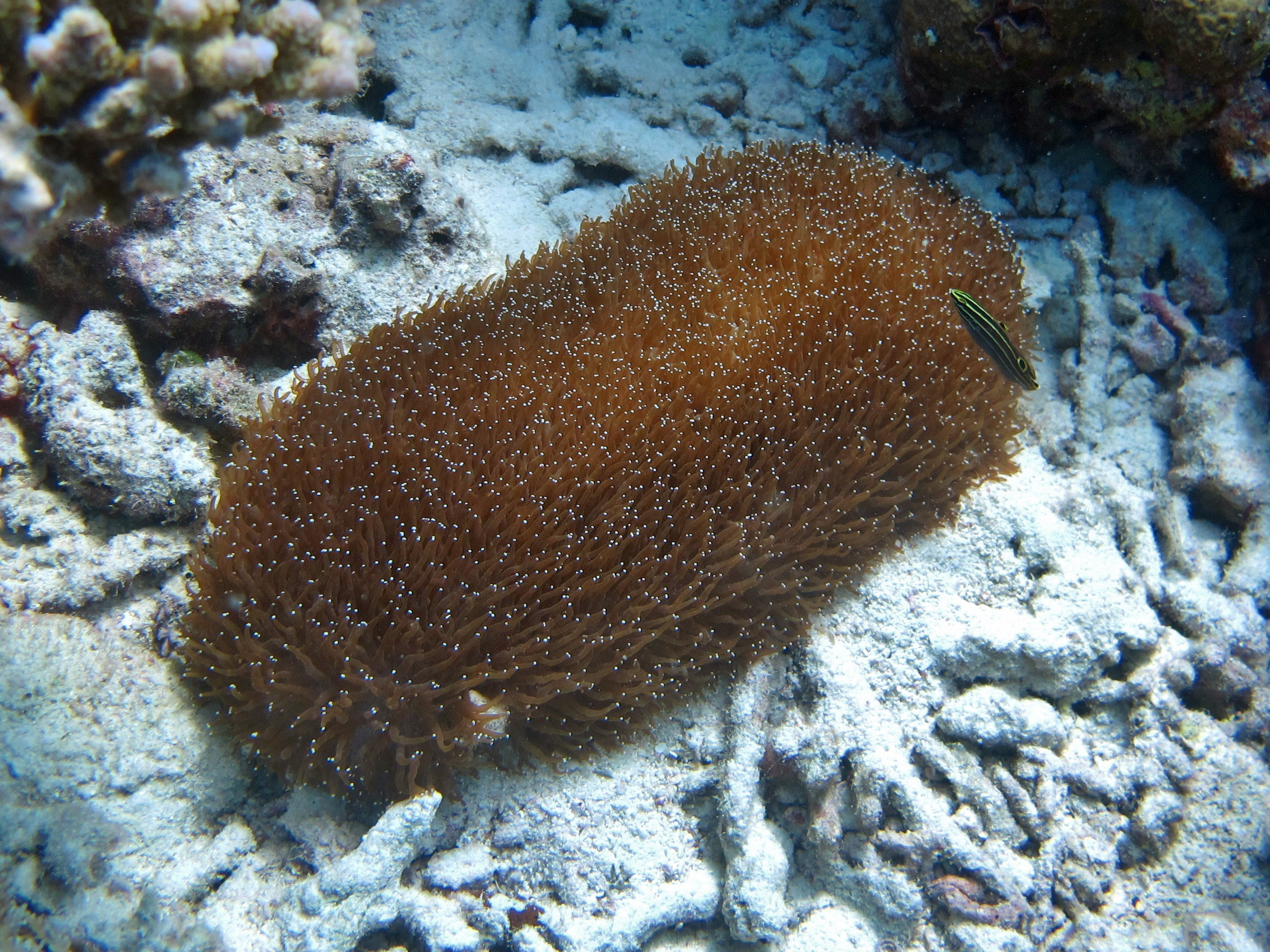 Un corail-champignon (Fungia sp ?) à Voavah, aux Maldives (atoll de Baa).